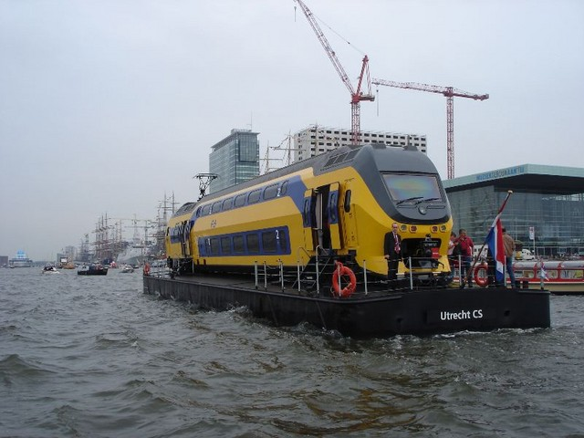 Railklipper